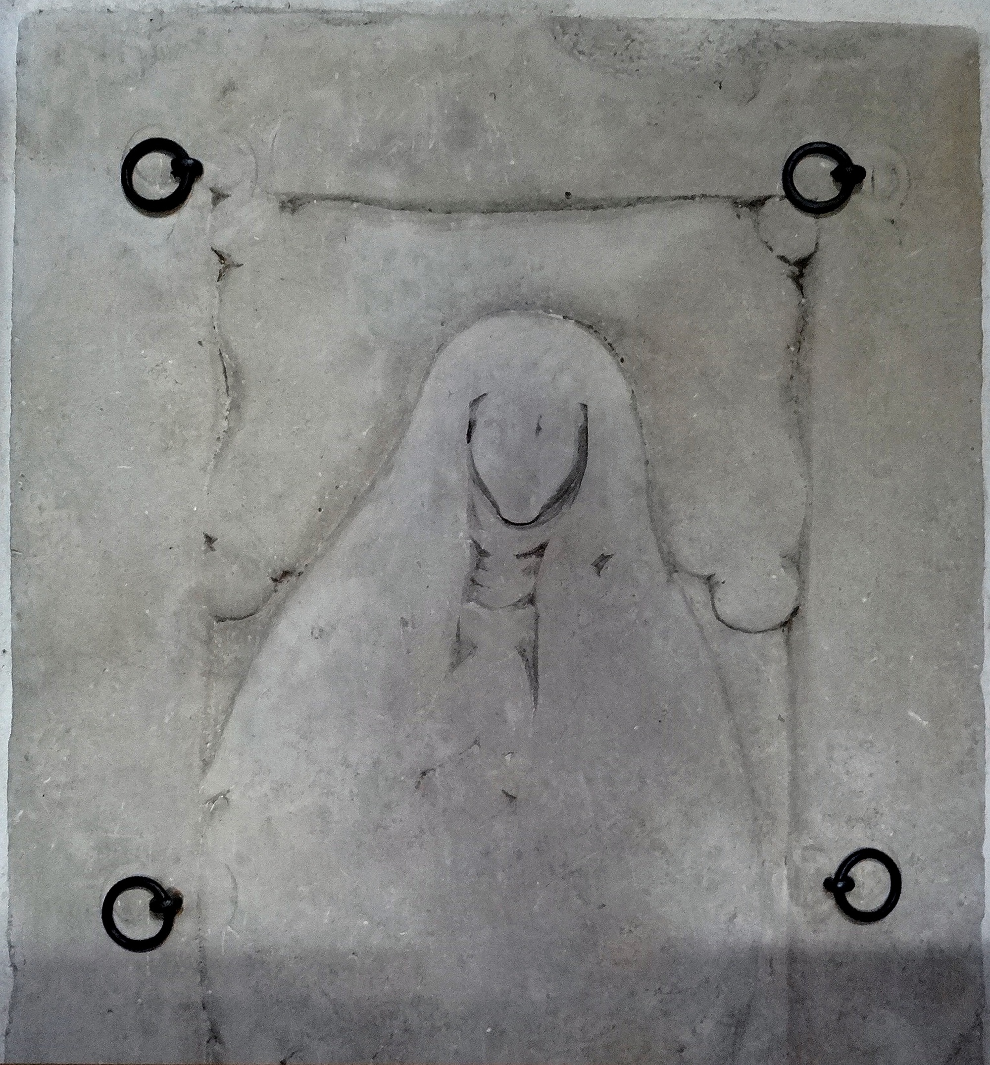 Kruszwica, kolegiata p.w. śś. Piotra i Pawła, 1120-1130, piaskowcowa płyta nagrobna Zofii z Pampowskich Oporowskiej (zm. 1500 r.)